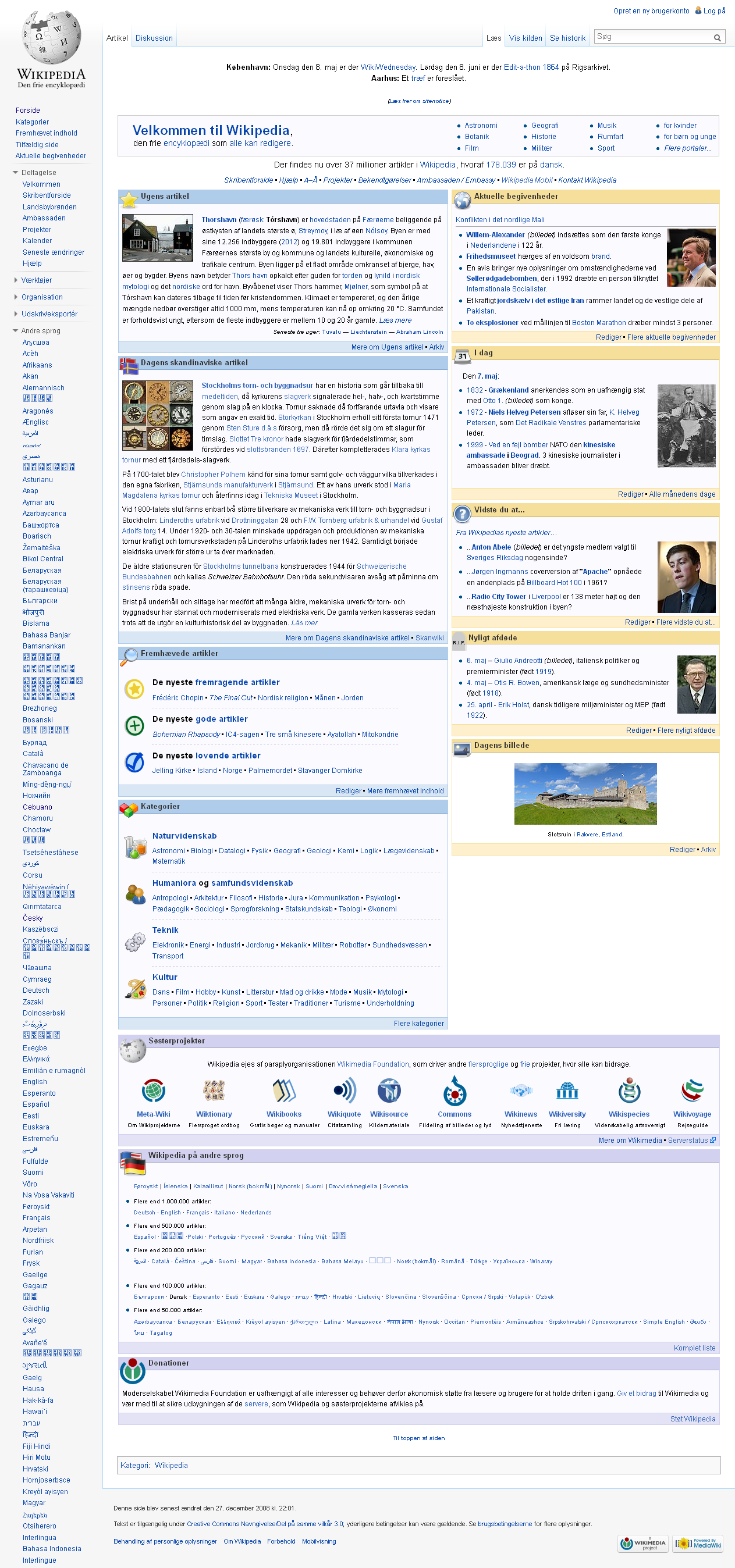 Screenshot - Hlavní strana Dánské Wikipedie ze dne 7. května 2013